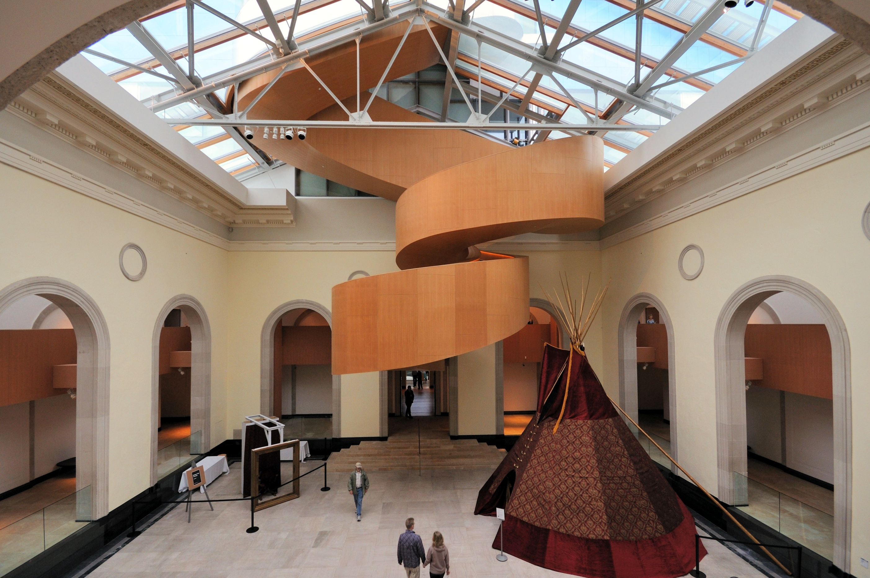 Toronto: Art Gallery of Ontario Art Gallery of Ontario Native nameArt Gallery of OntarioLocationTorontoCoordinates43° 39′ 14″ N, 79° 23′ 34.01″ W Established1900, renamed 1966Web page control : Q670250 VIAF: 151879312 ISNI: 0000 0004 1936 9414 ULAN: 500245617 LCCN: n81063191 NLA: 35008619 WorldCat institution QS:P195,Q670250